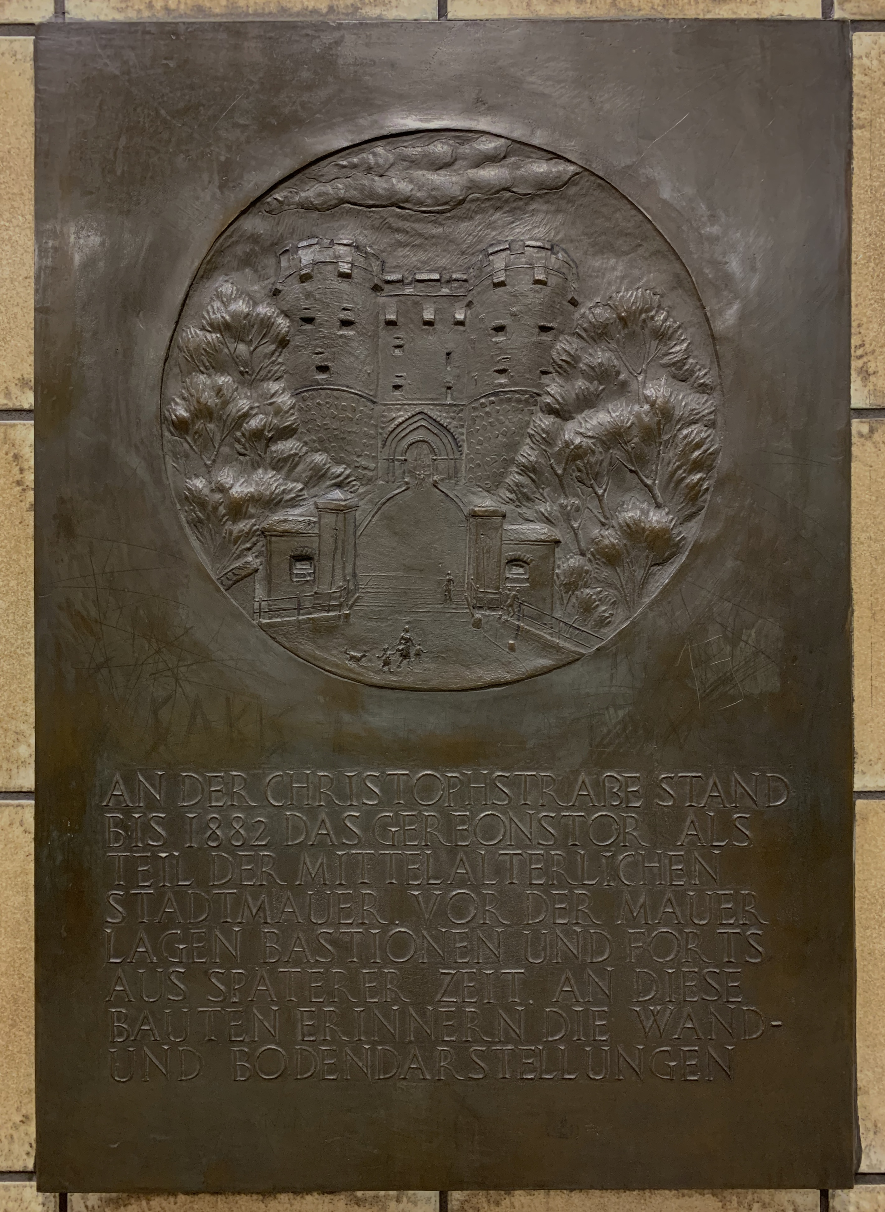 Bronzetafel im U-Bahnhof Christophstraße/Mediapark in Köln. Text: AN DER CHRISTOPHSTRASSE STAND BIS 1882 DAS GEREONSTOR ALS TEIL DER MITTELALTERLICHEN STADTMAUER. VOR DER MAUER LAGEN BASTIONEN UND FORTS AUS SPÄTERER ZEIT. AN DIESE BAUTEN ERINNERN DIE WAND- UND BODENDARSTELLUNGEN.